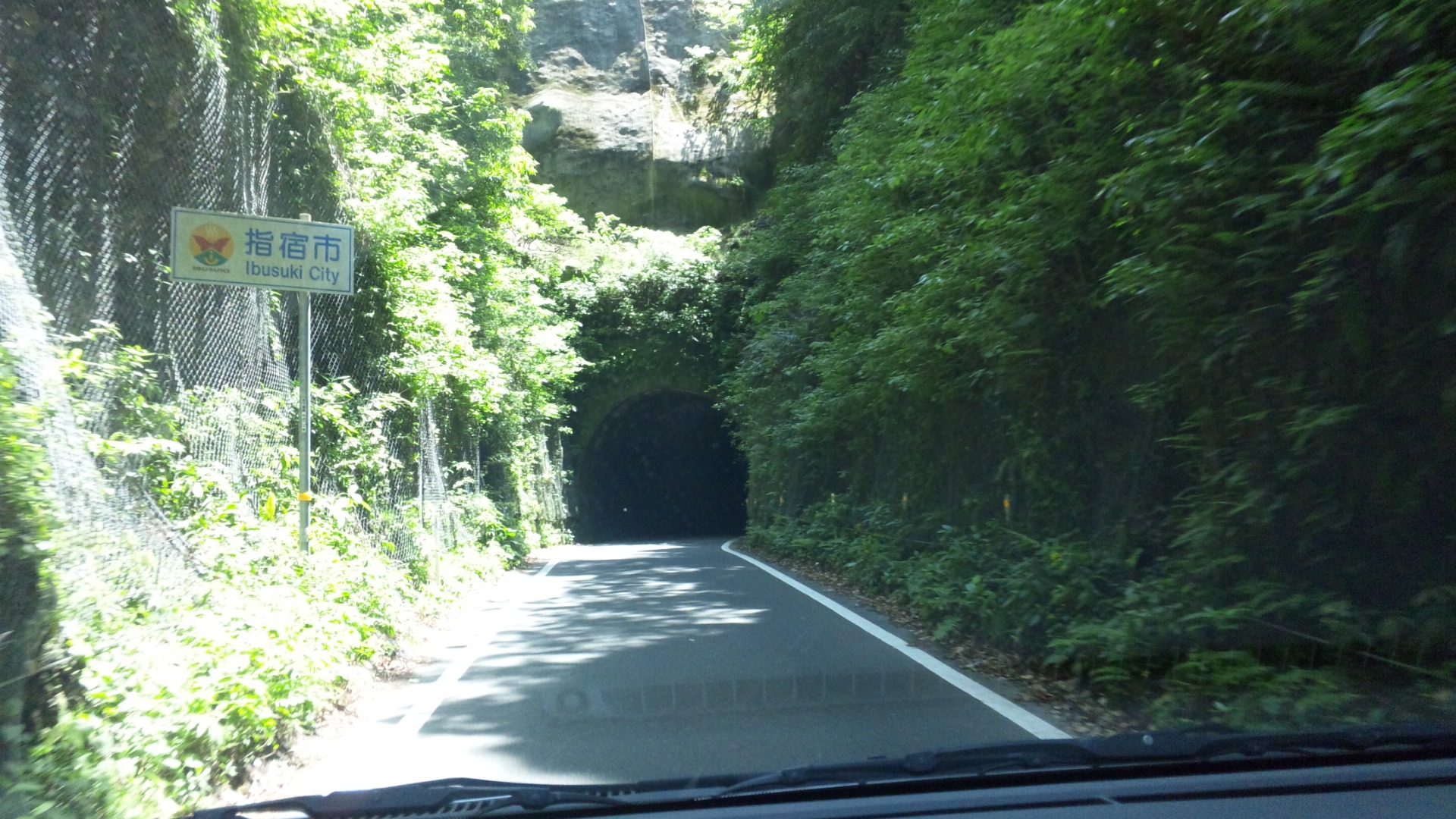 鹿児島県道236号のトンネルの写真